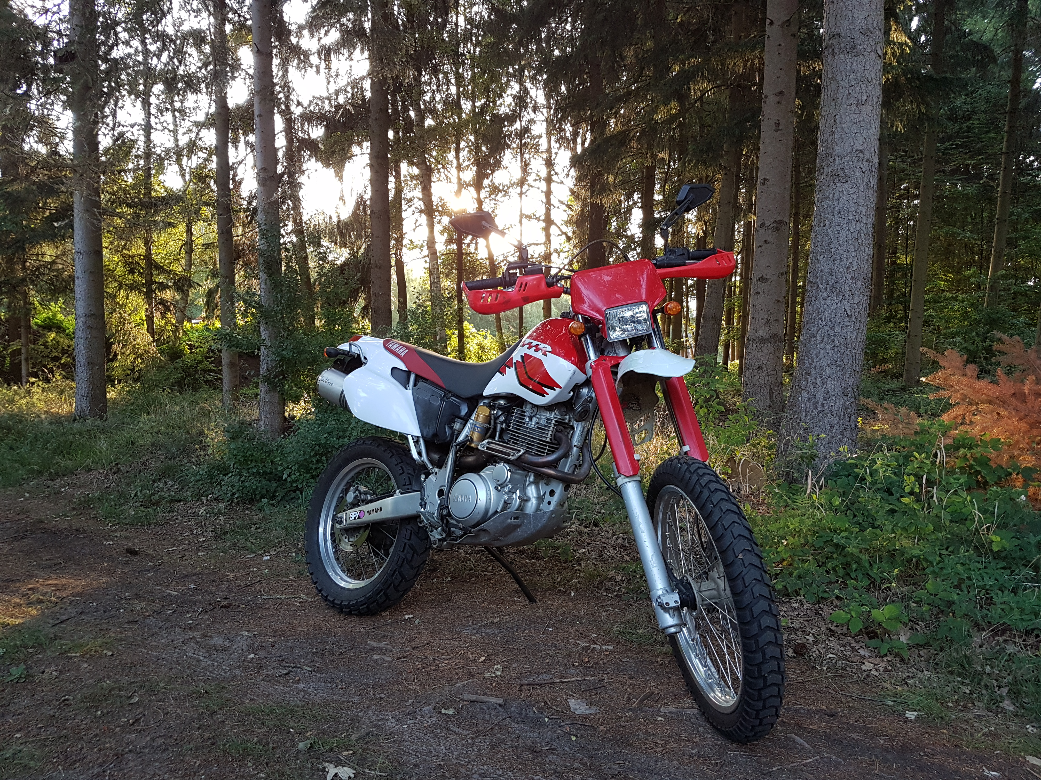 Yamaha TT600R Belgarda Bj. 1999